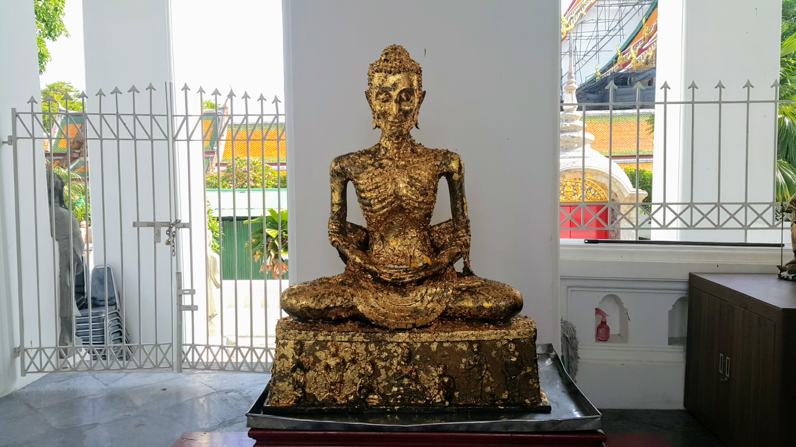 พระพุทธรูปปางบำเพ็ญทุกรกิริยาในวัดแห่งนึงในกรุงเทพมหานคร